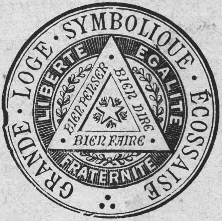 Photo du Sceau de la Grande Loge Symbolique Écossaise, provenant du Bulletin maçonnique de la Grande Loge Symbolique Écossaise, n°87, de 1887.